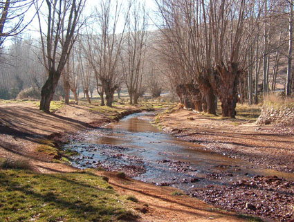 Fotografía Comarca del Jiloca